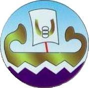 شعار محافظة كفر الشيخ